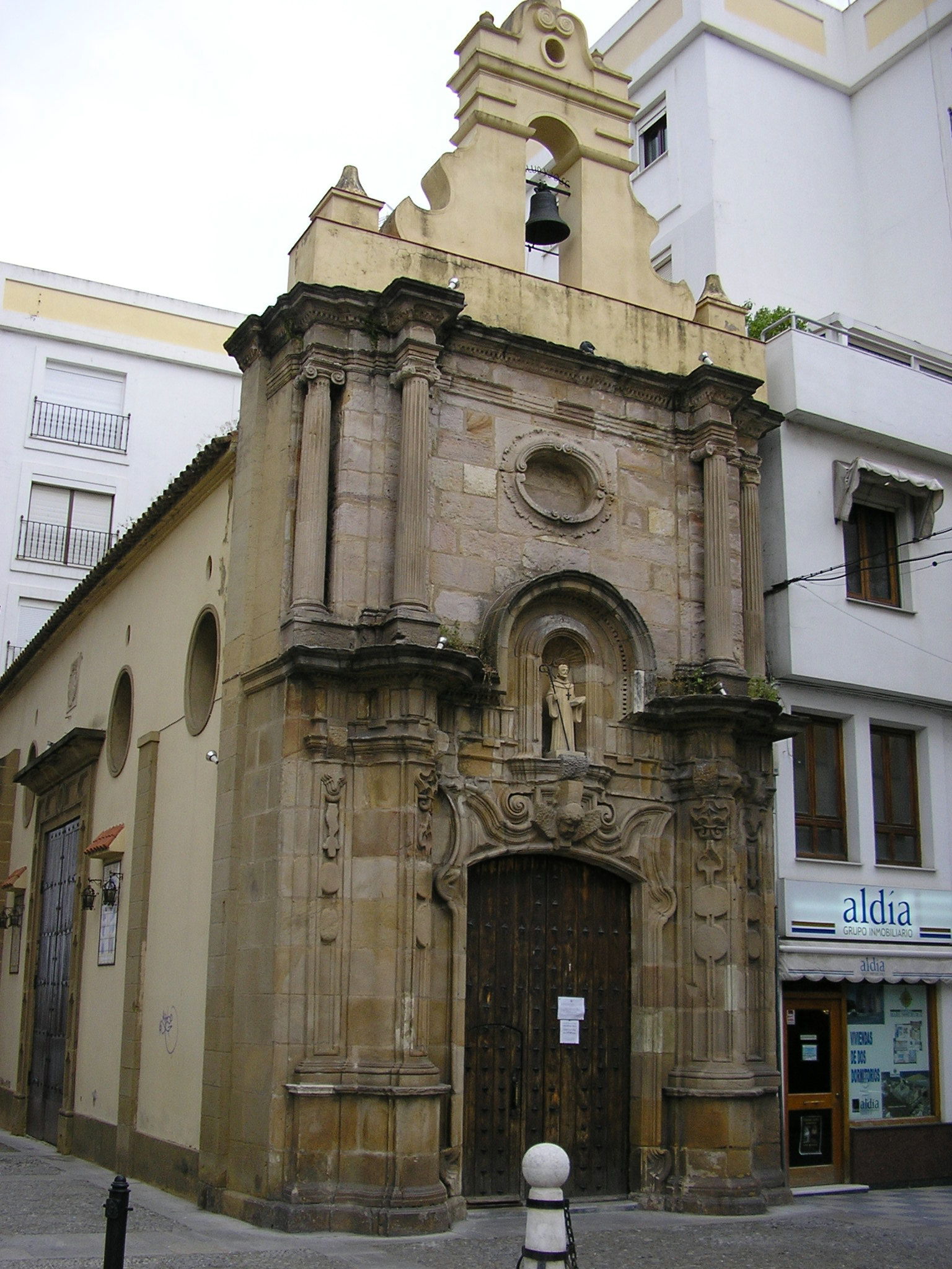 Capilla de Nuestra Señora de Europa en la localidad andaluza de Algeciras (España)